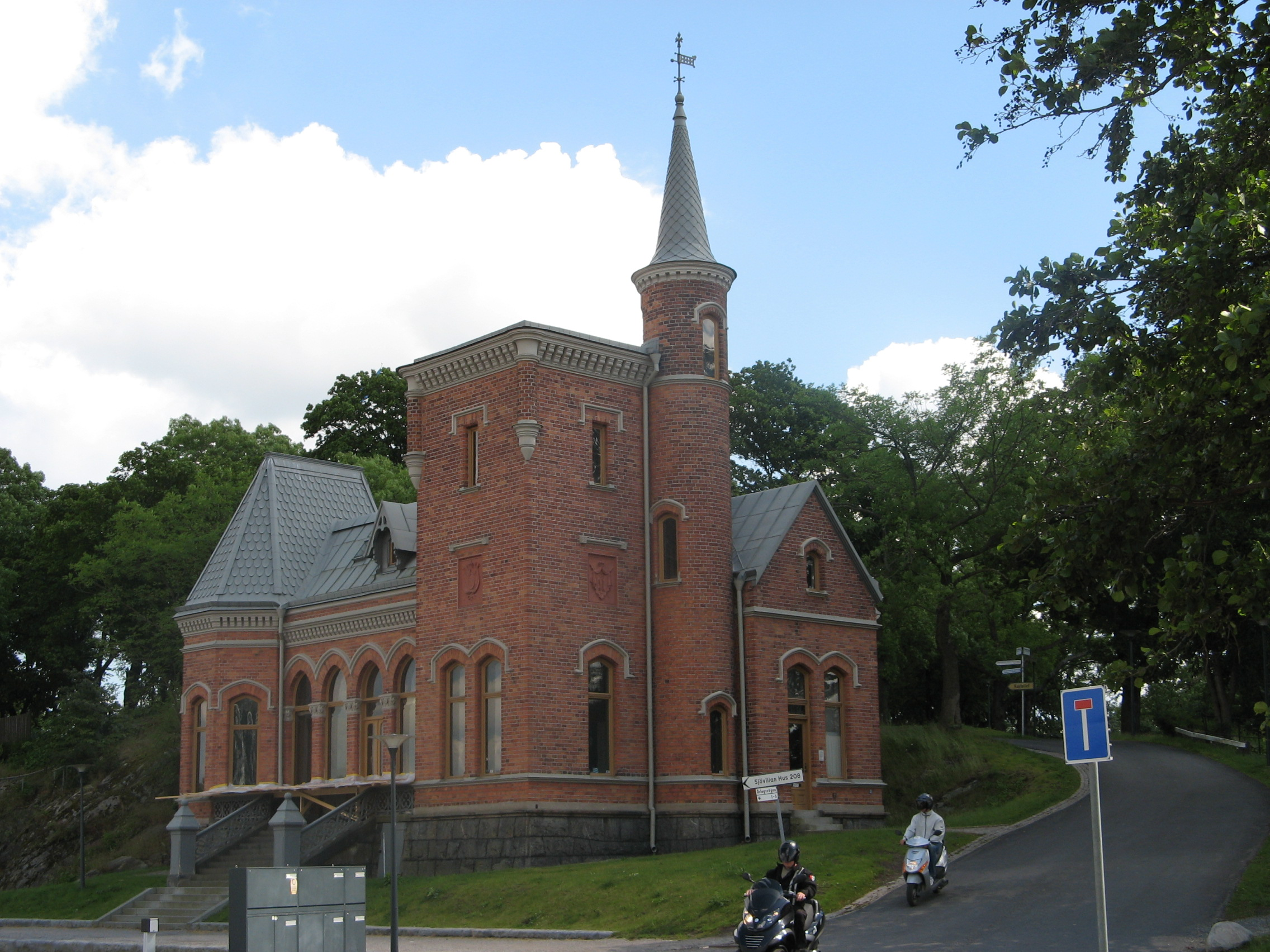 Skridskopaviljongen, Stockholm, Sverige